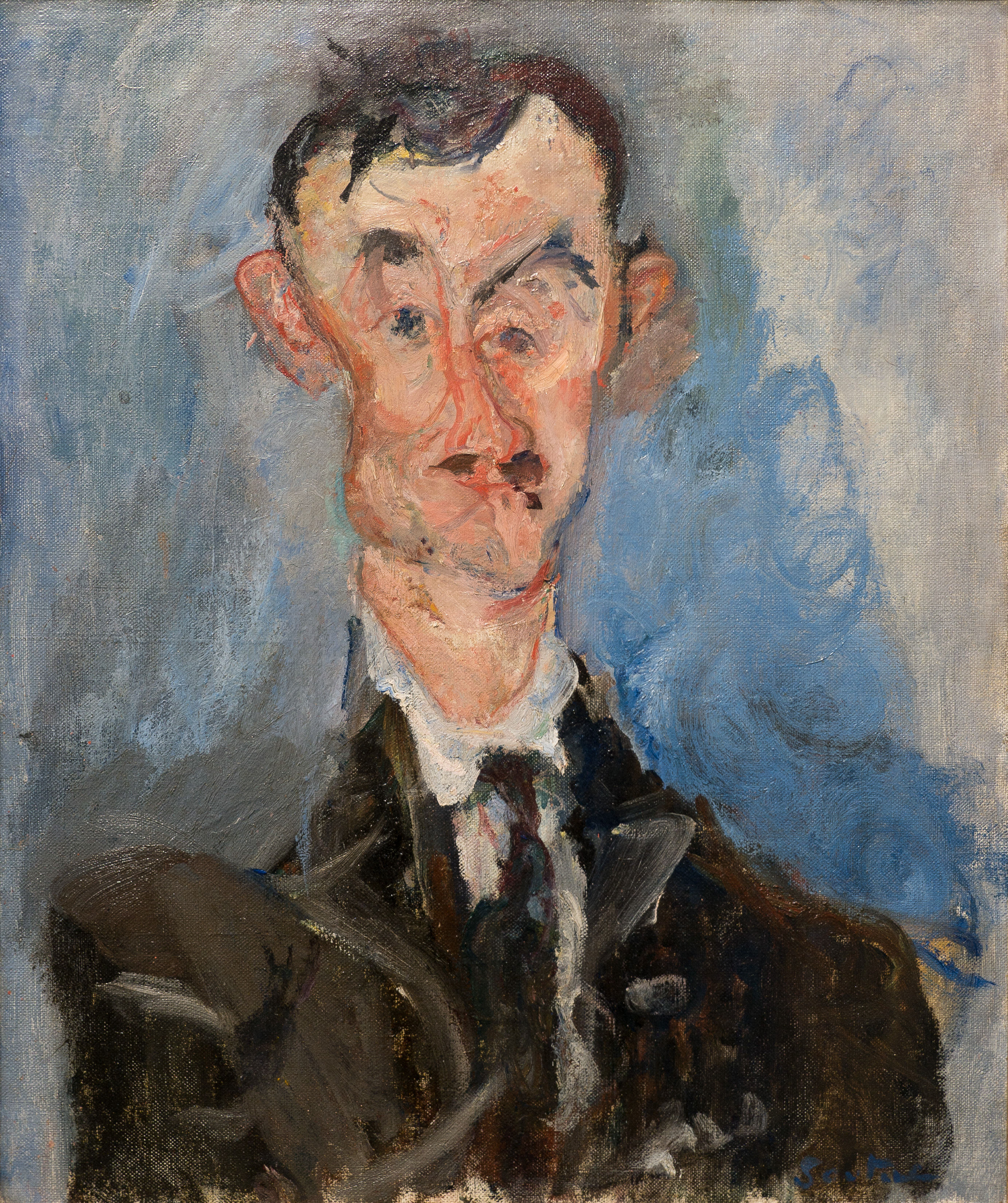 Chaïm Soutine (1893 - 1943), "Portrait d'homme (Émile Lejeune)", huile sur toile, vers 1922-1923, Coll. Jean Walter et Paul Guillaume, Musée de l'Orangerie, Paris